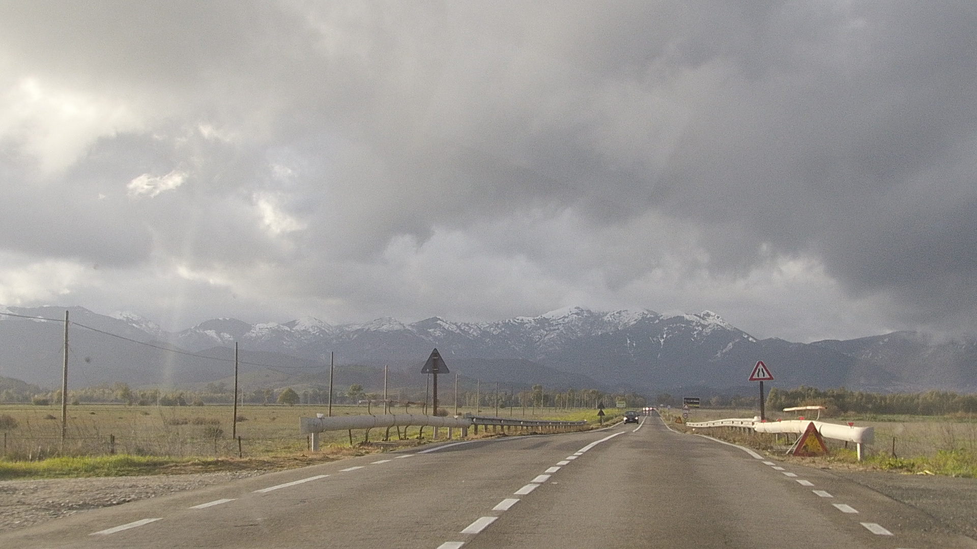 Strada Statale 196 di Villacidro d'inverno, con i monti di Villacidro sullo sfondo.